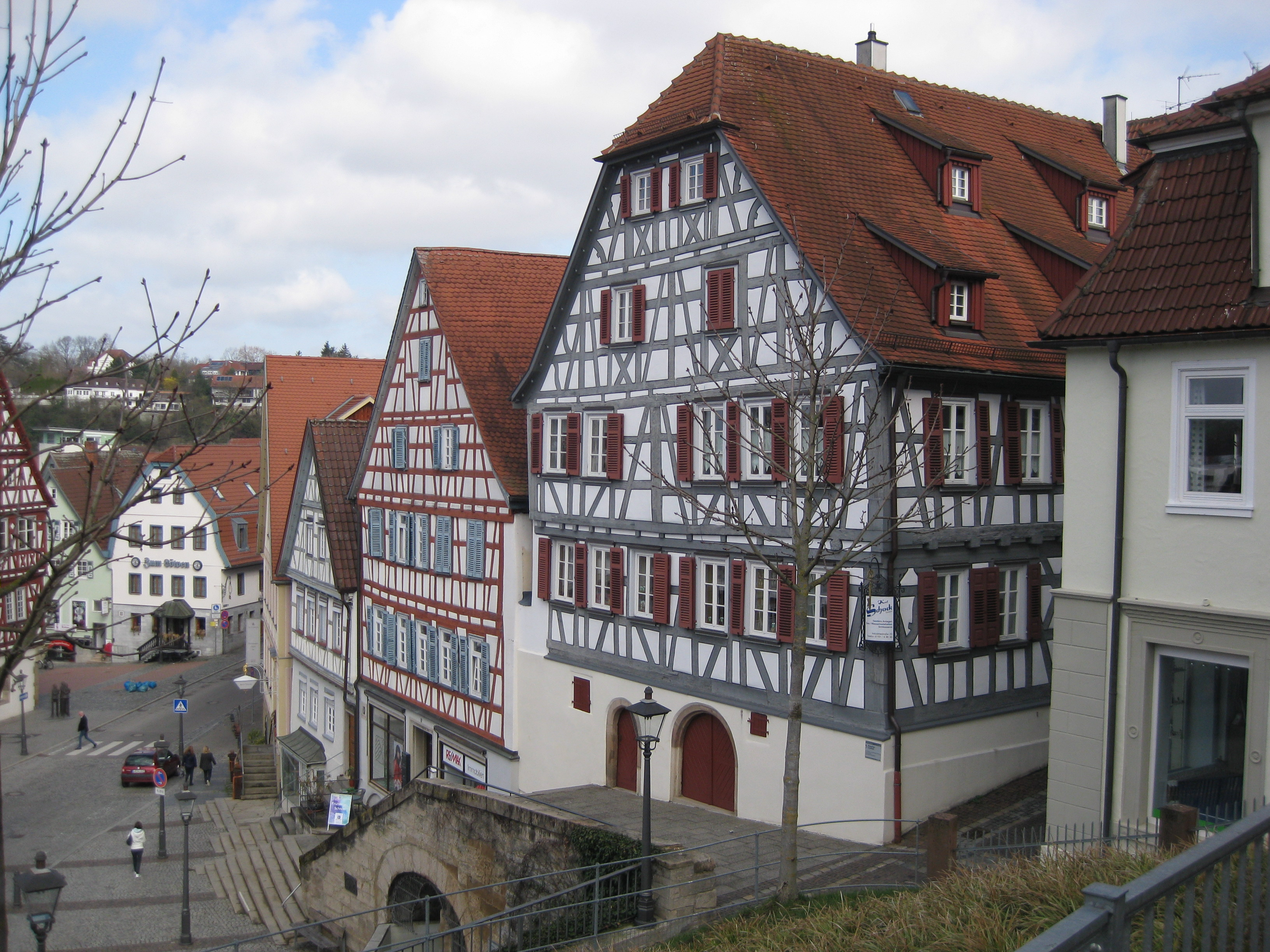 Backnang Ehemaliges Schulhaus